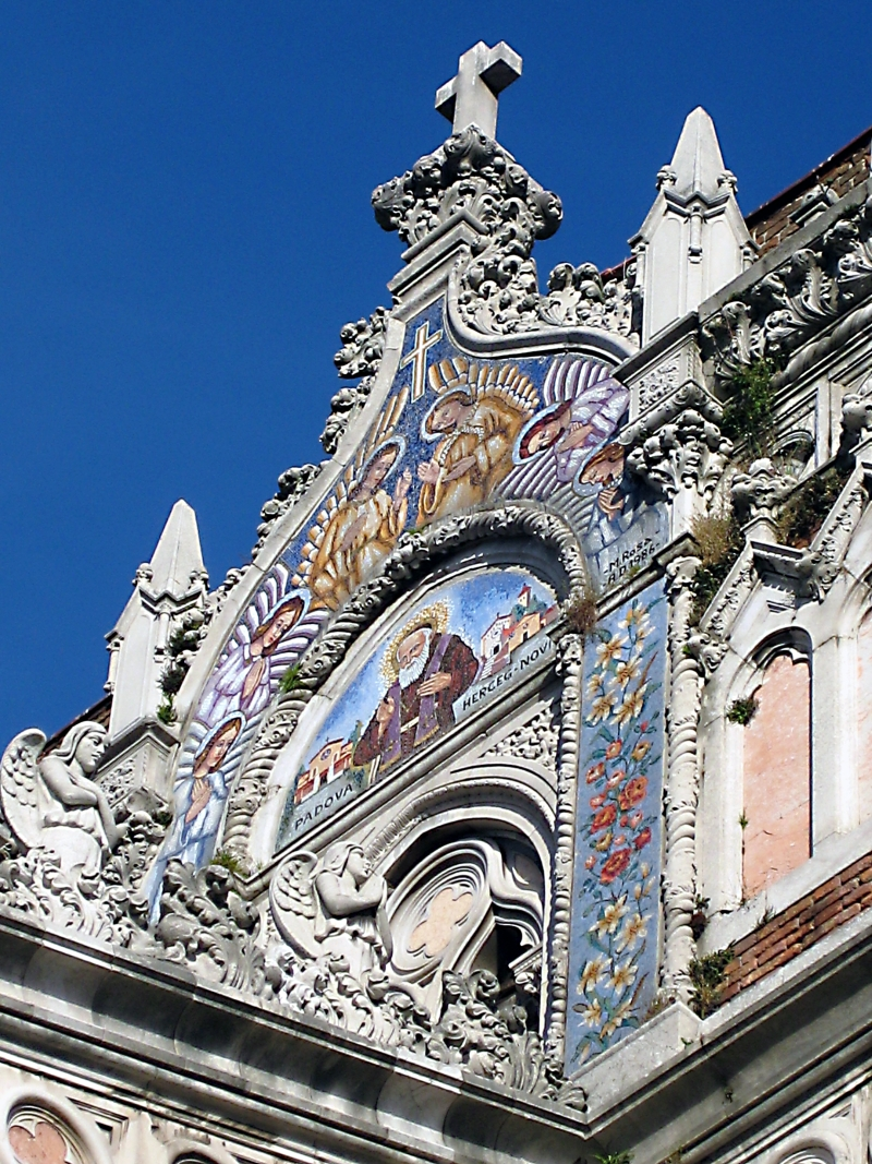 detalj sa Sv. Leopoldom Bogdanom Mandićem na crkvi Gospe Lurdske u Rijeci. Croatia